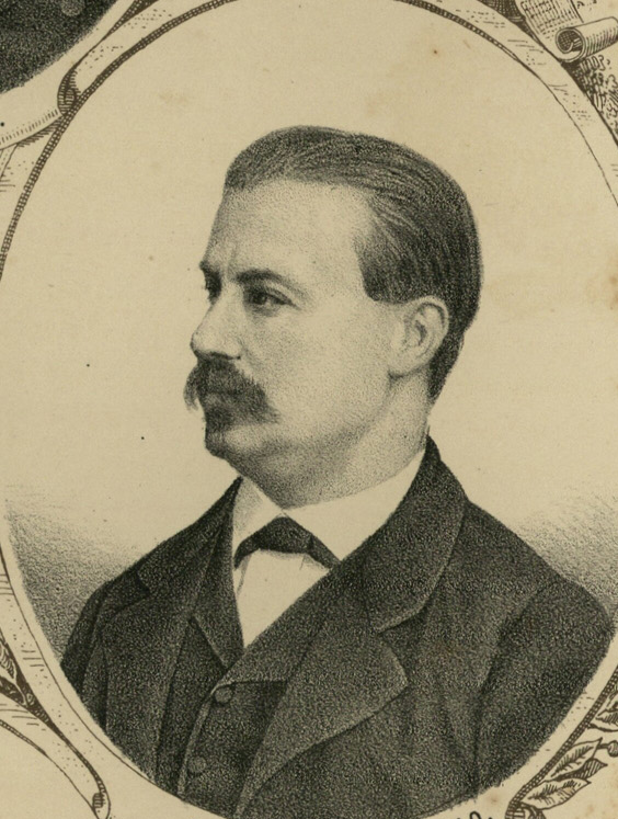 Lámina de Los diputados pintados por sus hechos. J. de Peralta, J. Palau y Generés, A. Cánovas del Castillo, J. García Briz.